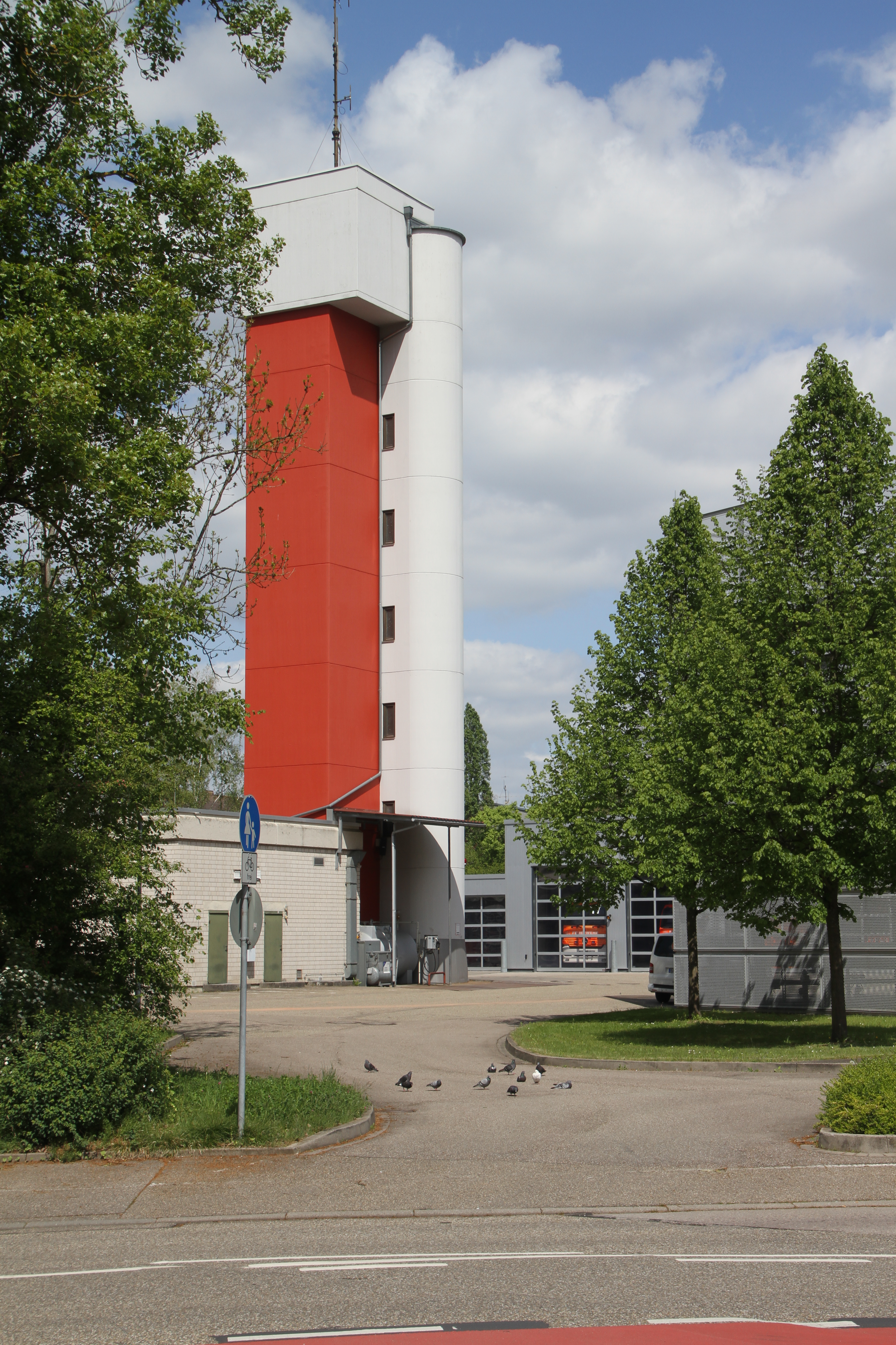 Feuerwehrhauptquartier Schwarzwaldstraße 50.